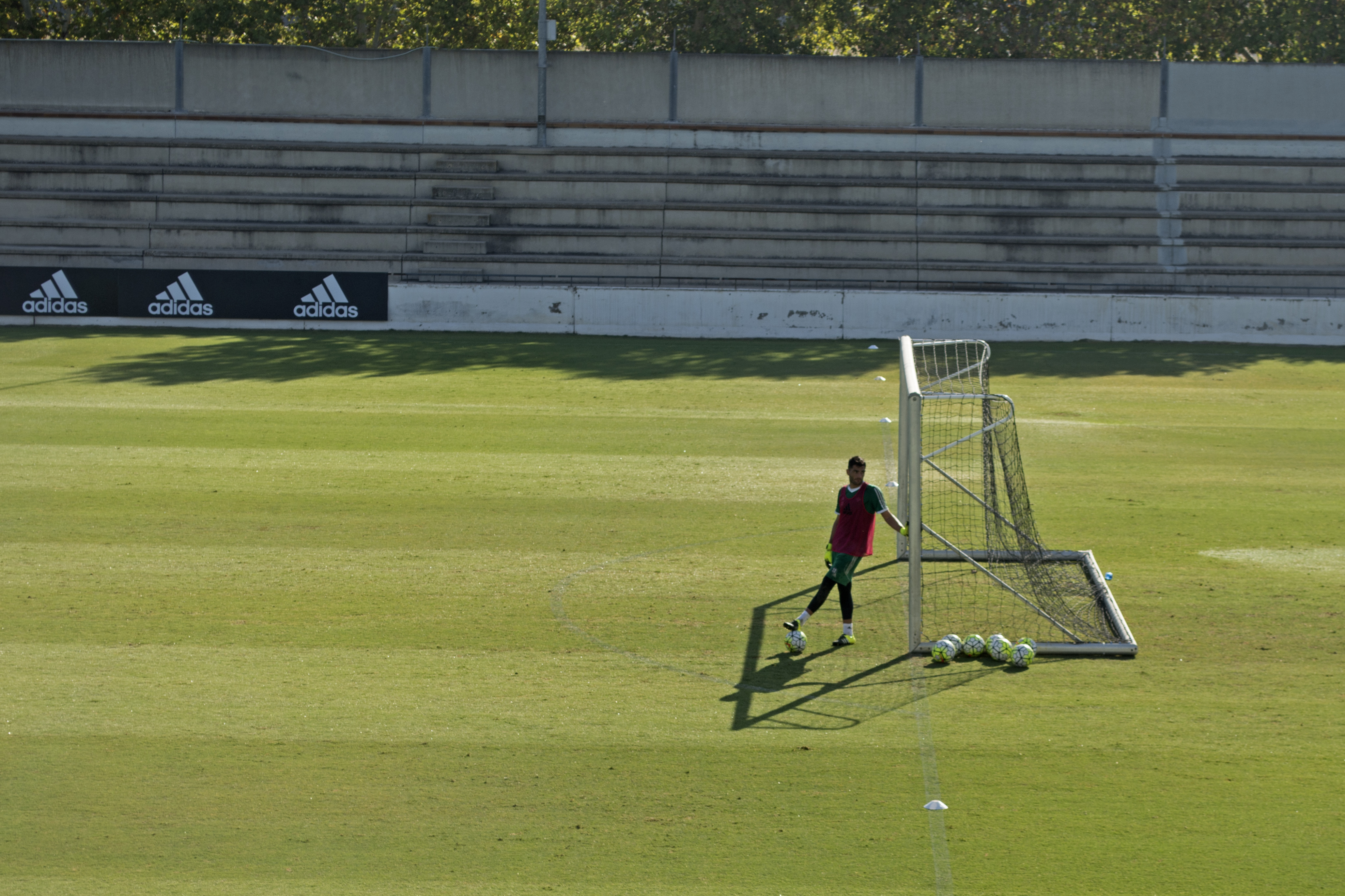 Antonio Adán durante un entrenamiento con el Real Betis en la ciudad deportiva Luis del Sol.